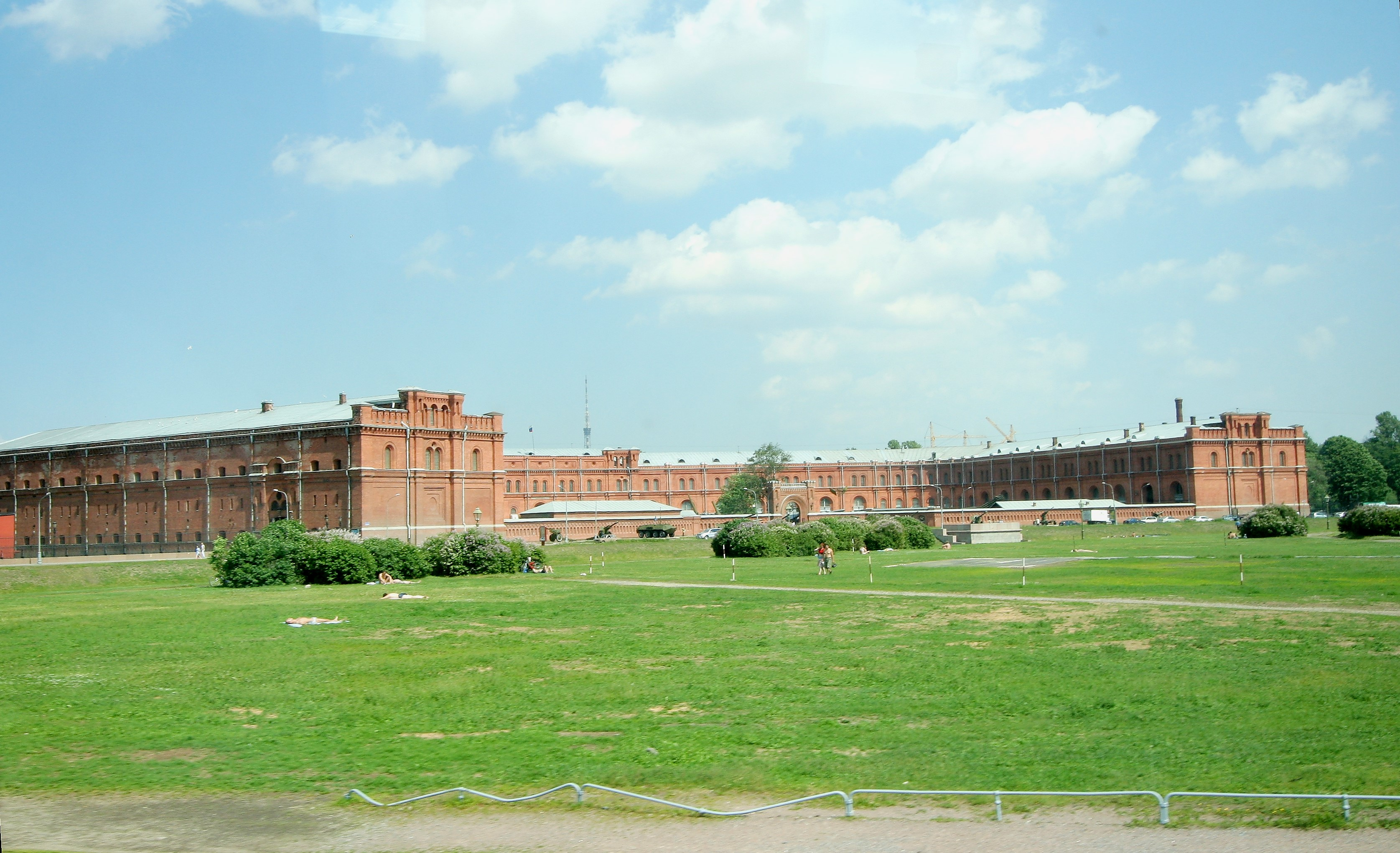 St.Petersburg Artilleriemuseum